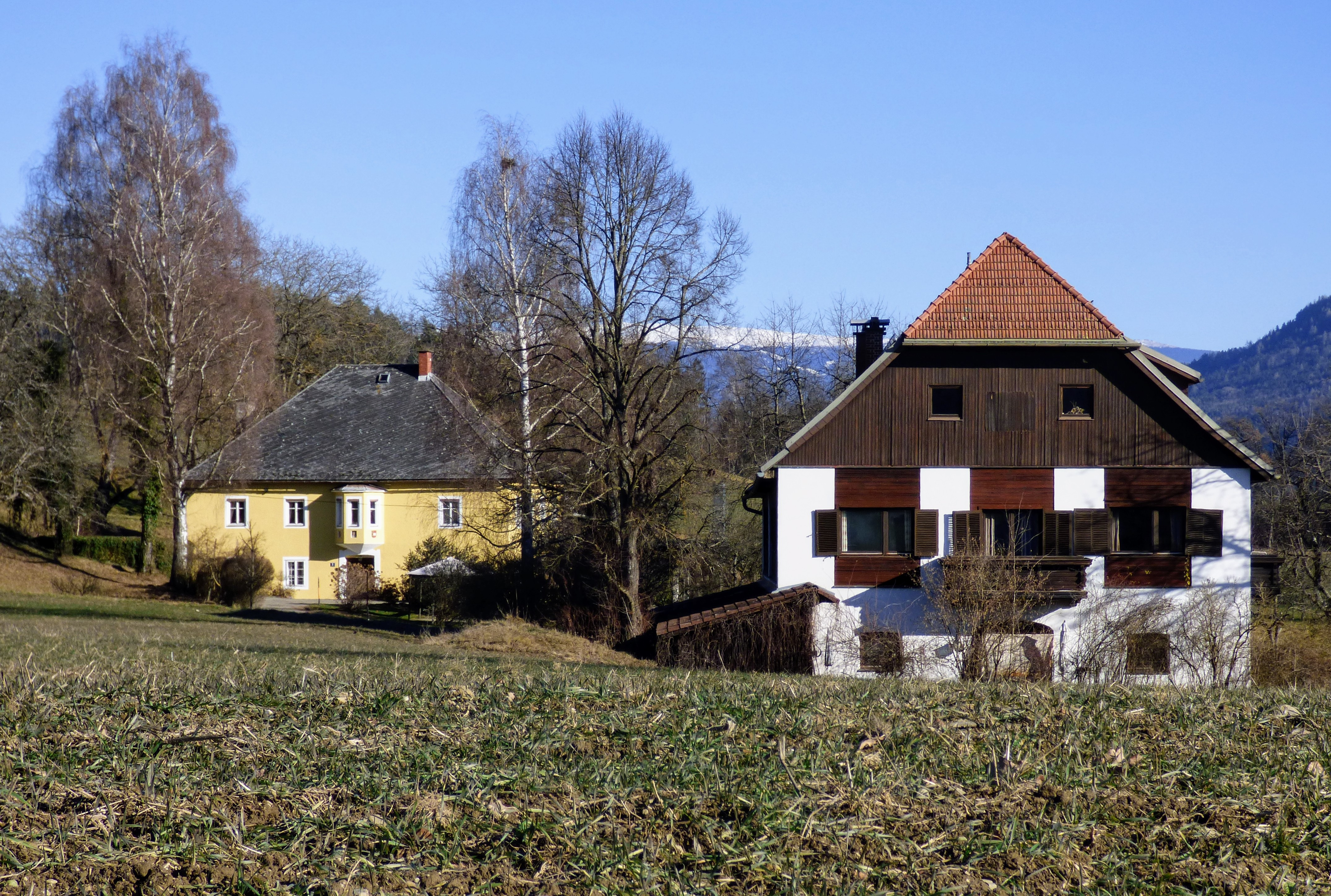 Laasdorf, Gemeinde St. Veit an der Glan, Kärnten Ansicht von Westen